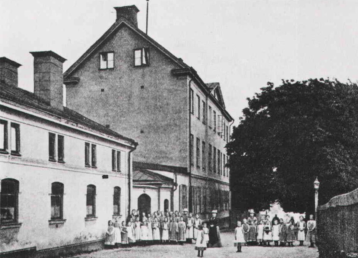 Utanför Stockholms stads uppfostringsanstalt för flickor. Bilden togs vid sekelskiftet. Foto ur J Muller, Fattigvården i Stockholm. Från äldre till nyare tid. 1906.